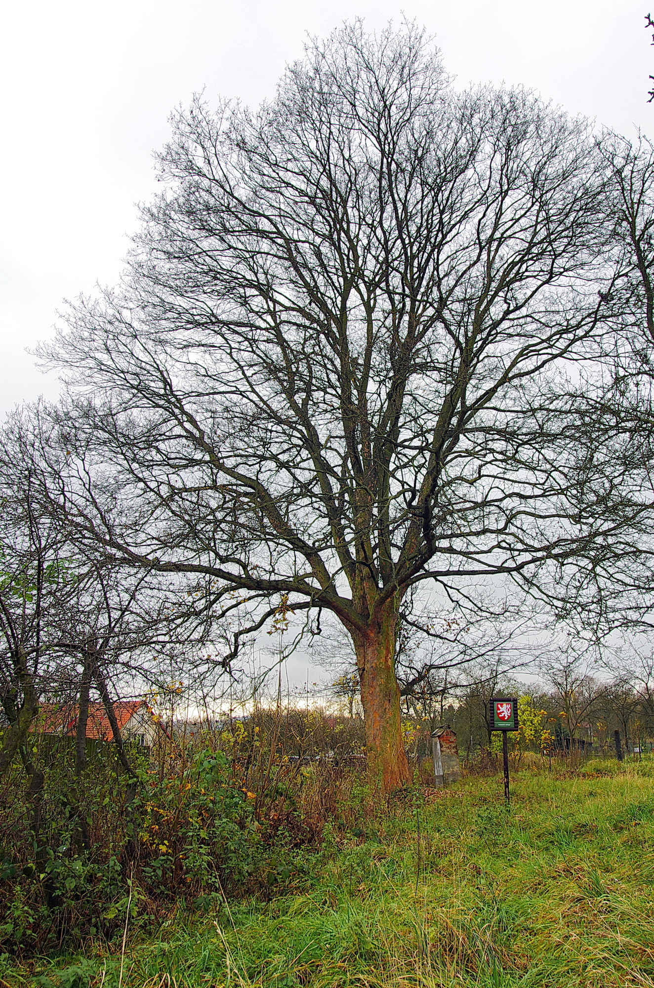 památný strom - Klen v Hlavně, okres Sokolov